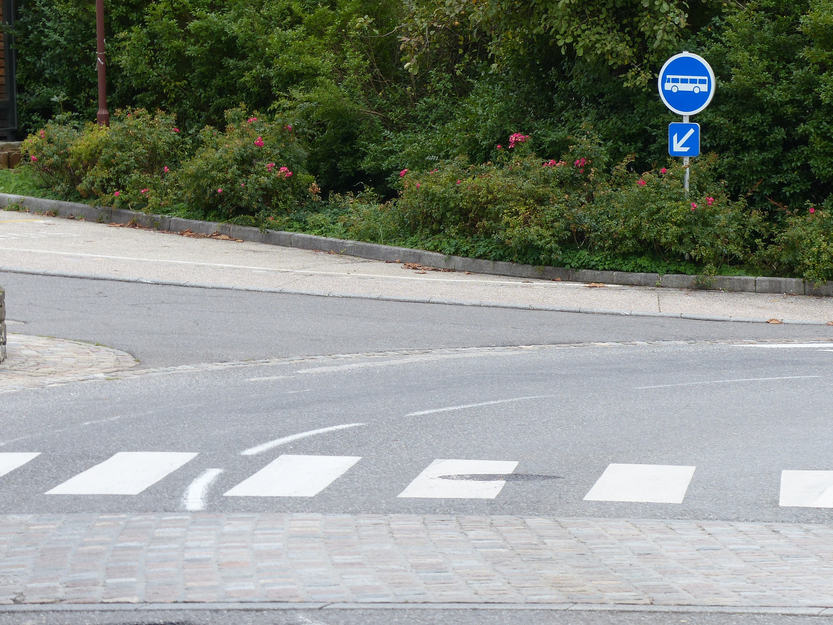 Panneau B27a, voie réservée aux véhicules des services réguliers de transport en commun.